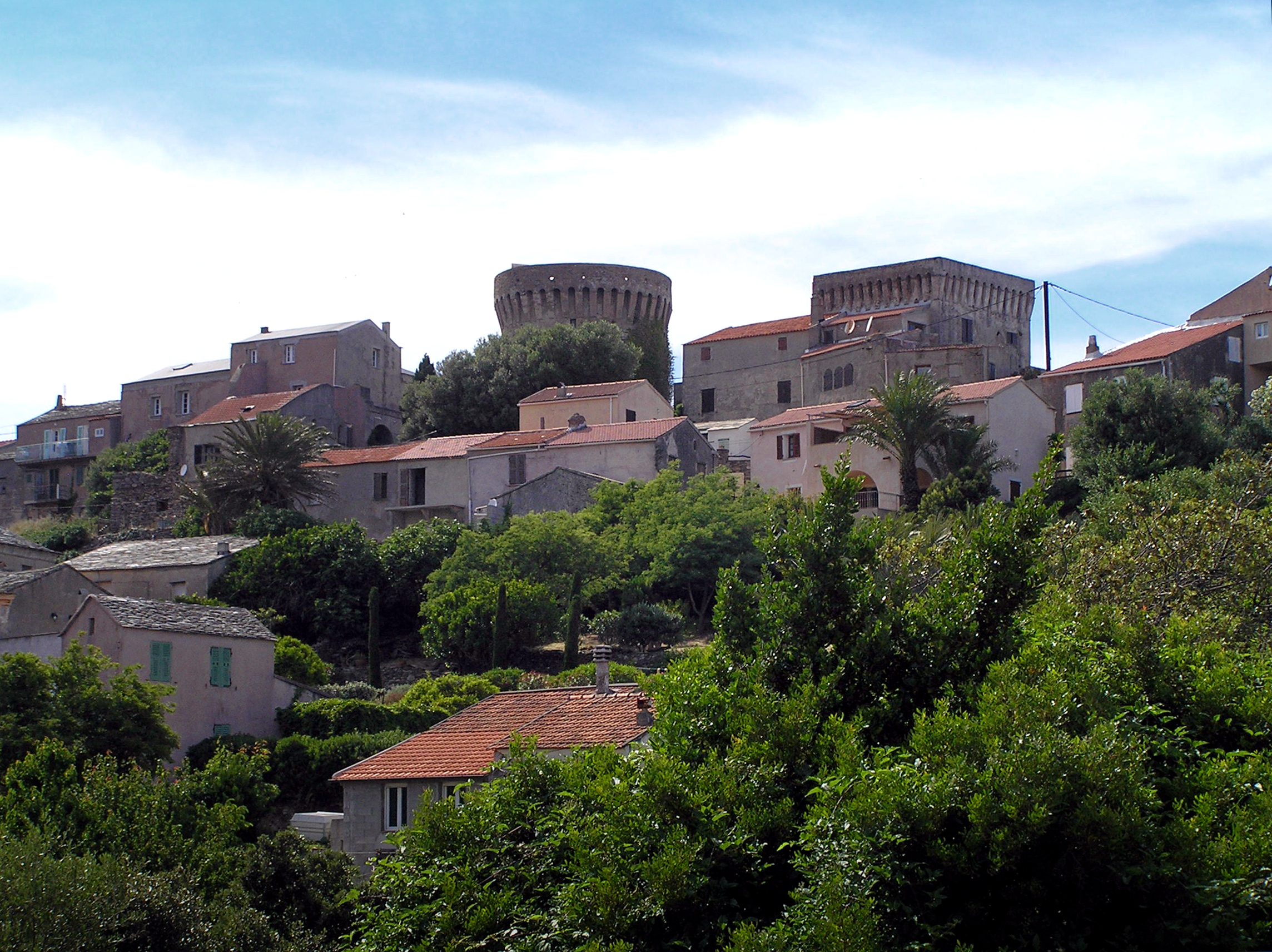 Tomino (Corse - Poggio et ses deux tours génoises